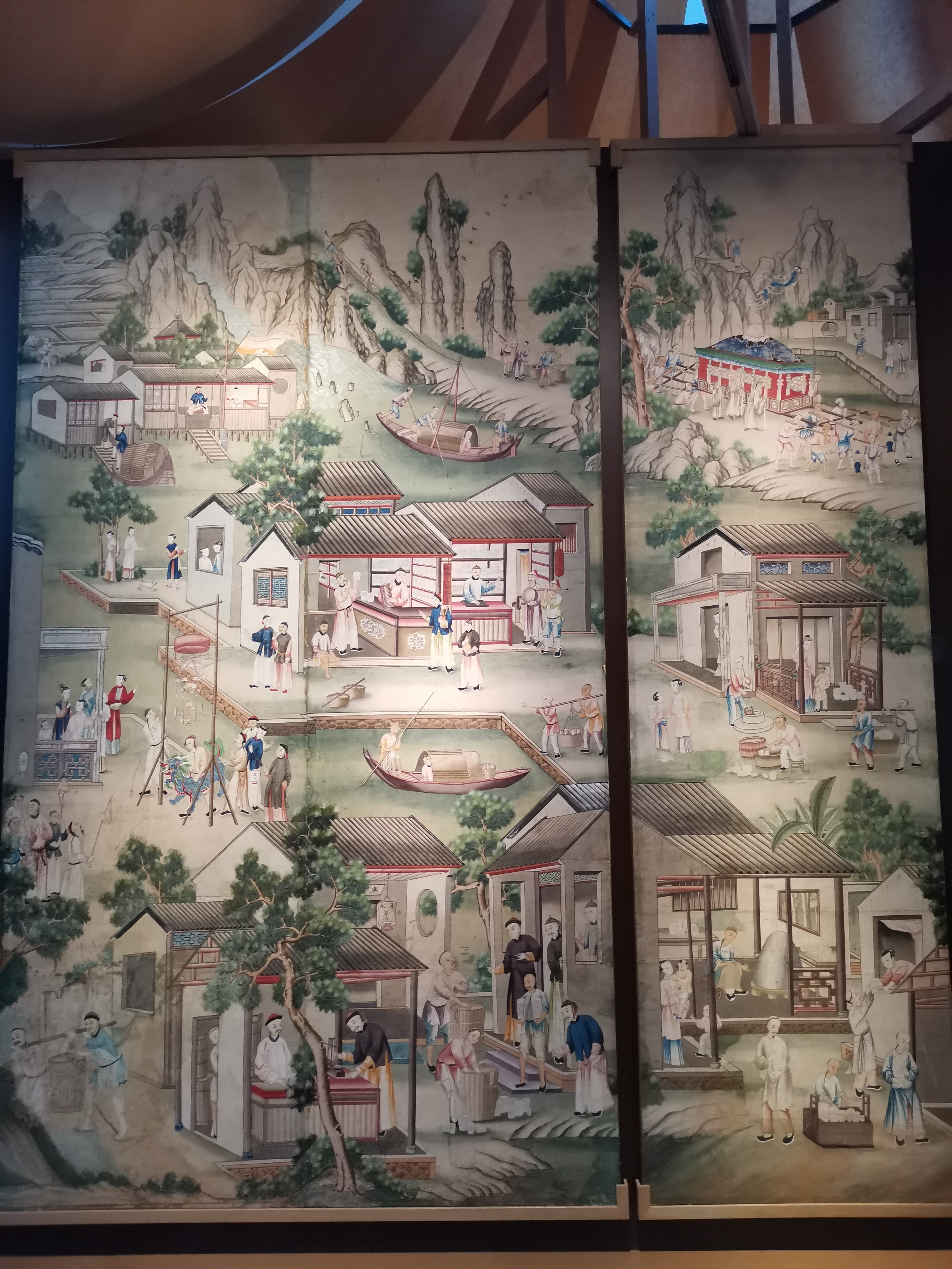 Deux feuilles d’une suite de six à décor chinois montrant la production du thé et la fabrication de la porcelaine. Chine. Canton. 18e s. Papier collé sur toile et gouache. Musée du Louvre. Paris. présenté au musée de Besançon en 2020.